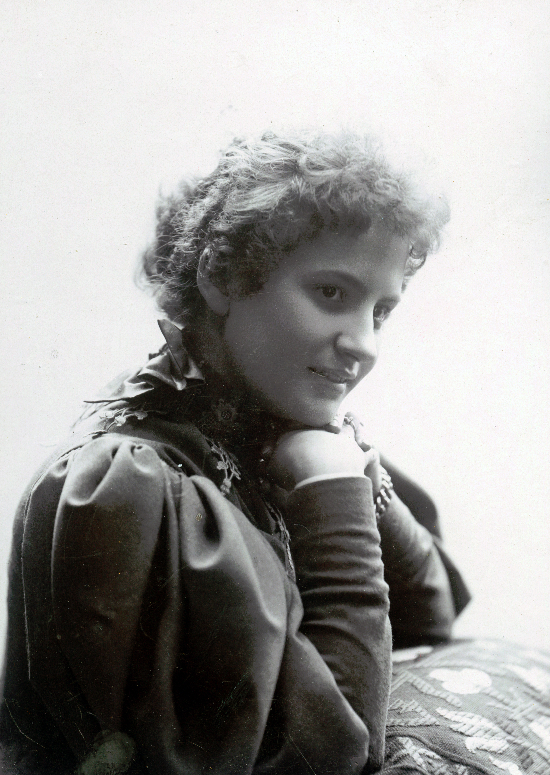 Elisabeth "Lisa" Ranft, skådespelare vid Albert Ranfts sällskap 1894